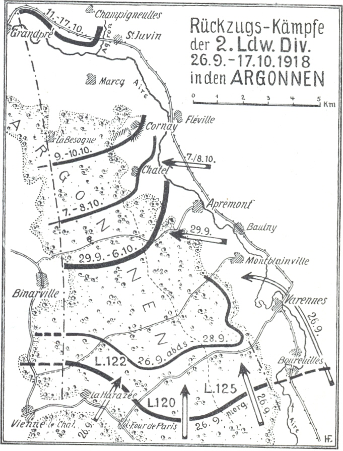 Karte: Rückzugskämpfe der 2. L.D. in den Argonnen 1918